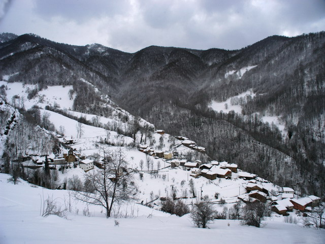 © jlgomezlinares